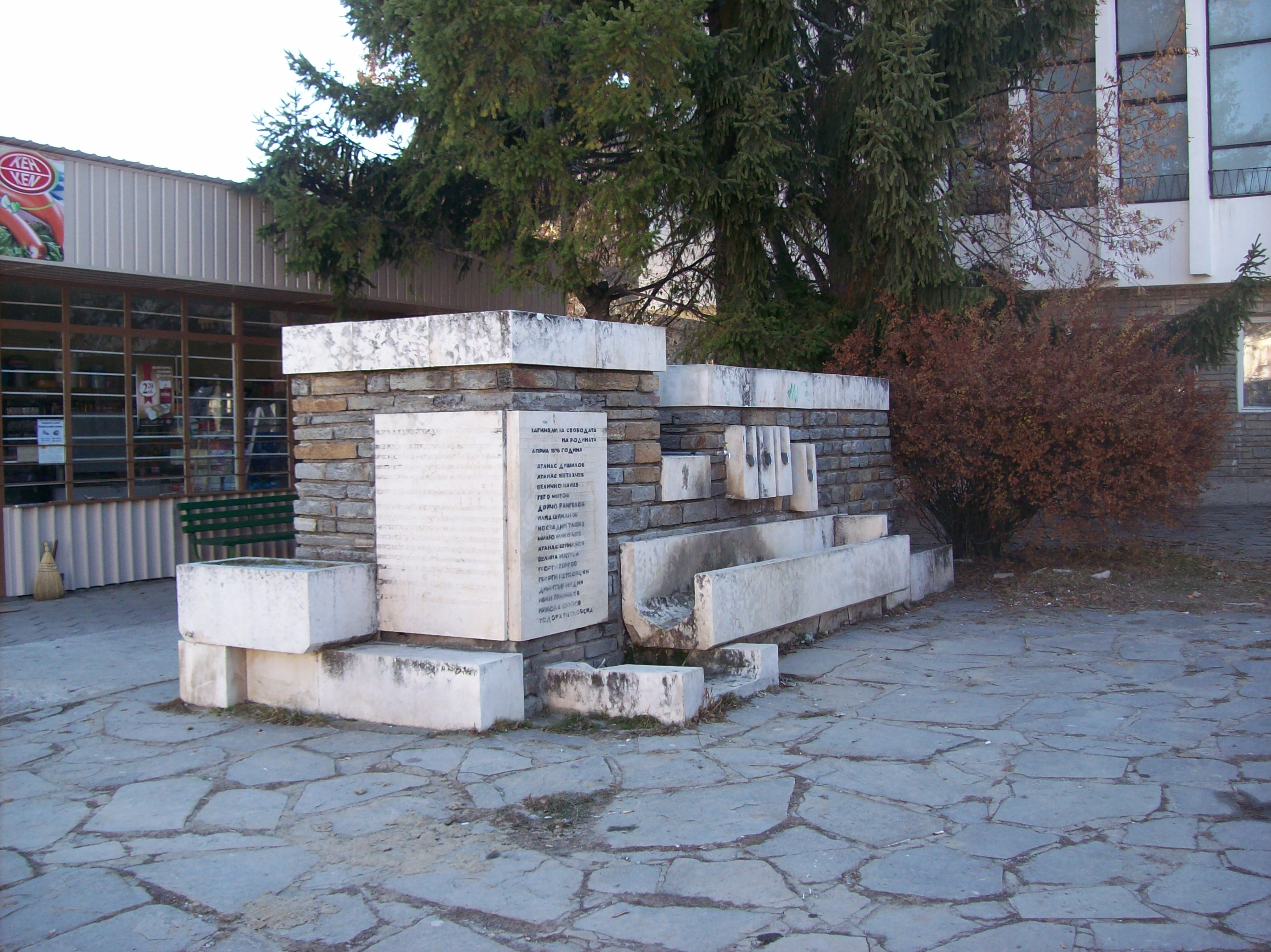 Паметна чешма на плщада на Бойково